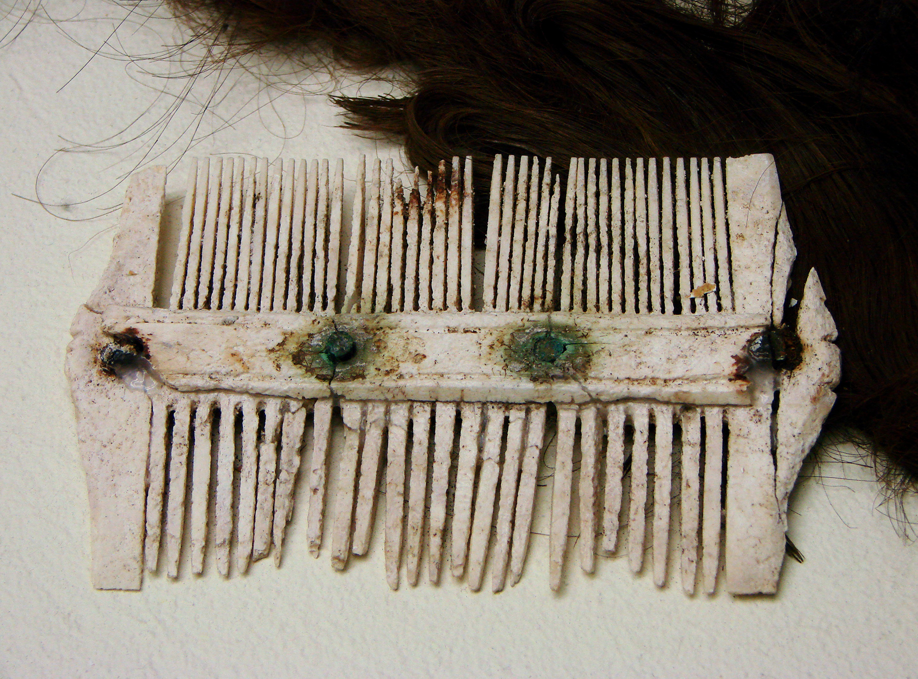 Peigne en os, époque gallo-romaine, trouvé Boulevard Pommery à Reims. Musée Saint-Remi à Reims.